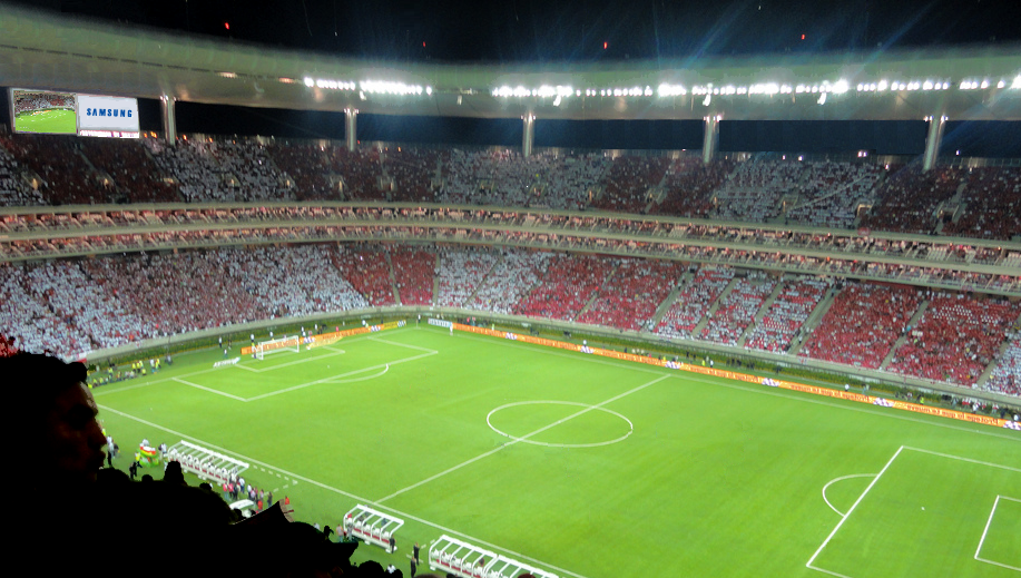 Estadio Omnilife in Zapopan, Mexico